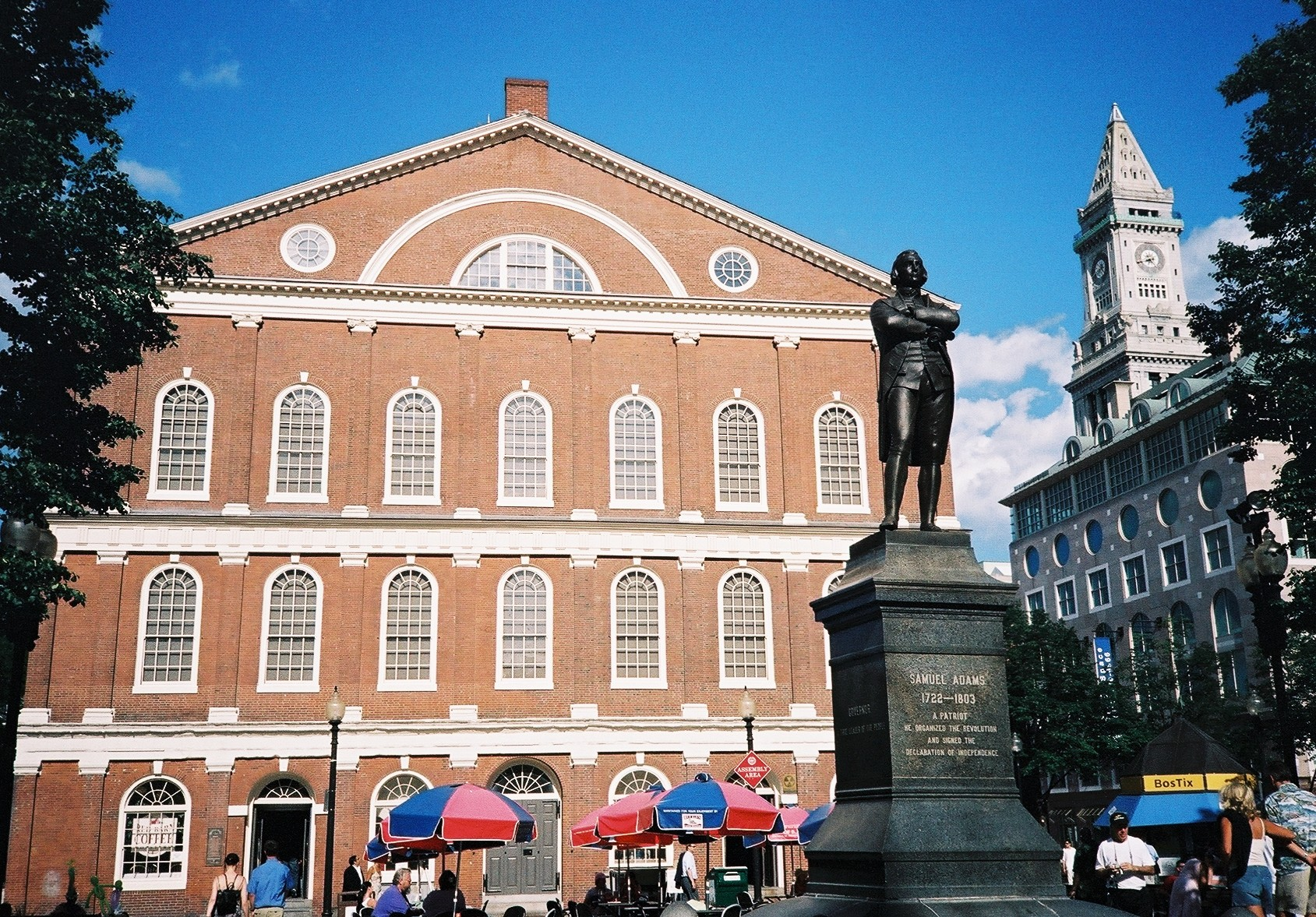 Fanueil Hall et statue de Samuel Adams (Boston, Massachussets).